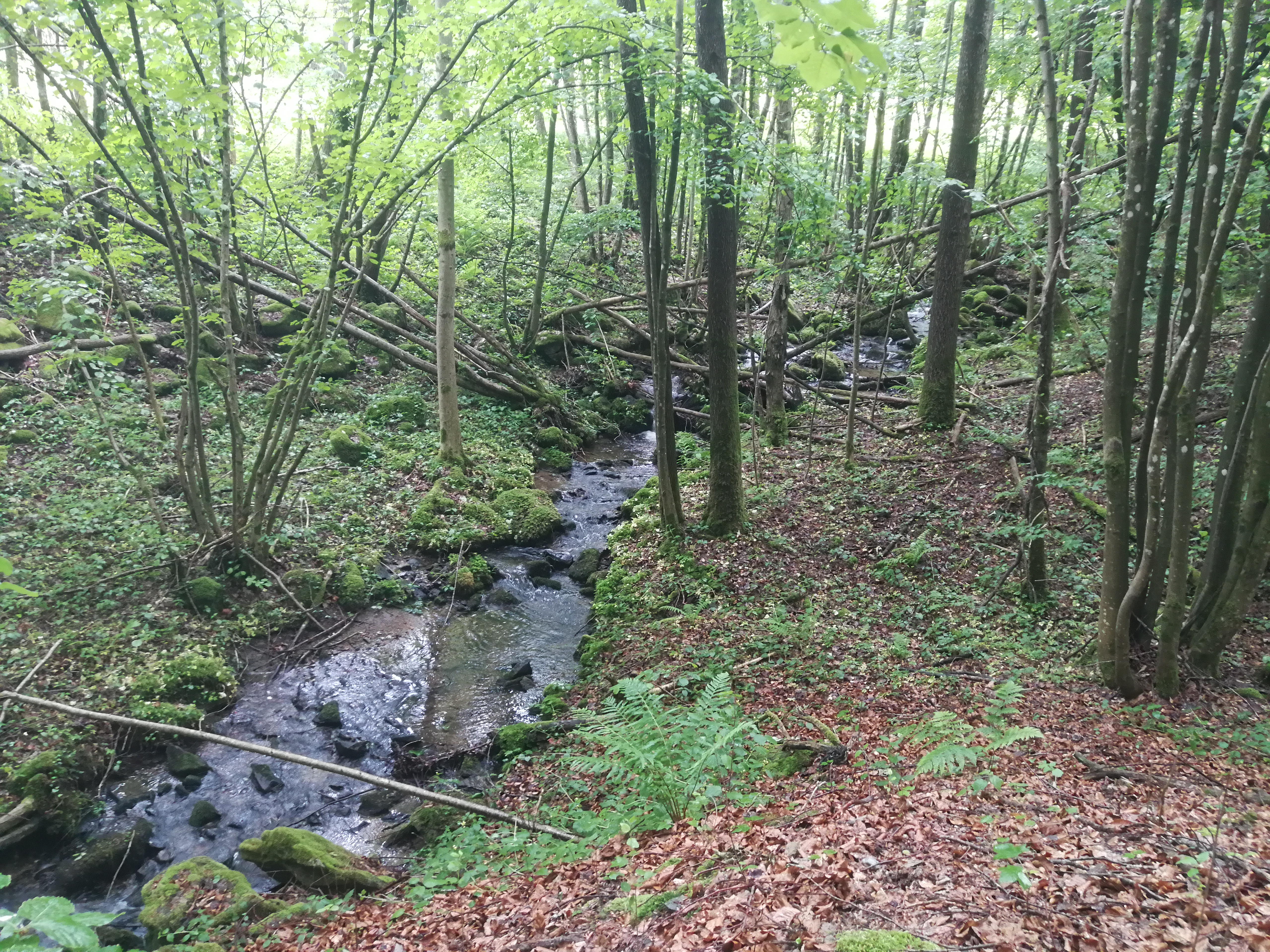 Renzlinger Mühlbach nordwestlich von Winsing, aufgenommen etwa 350 m bevor der Mühlbach bei Renzling unter der DEG16 hindurchfließt.